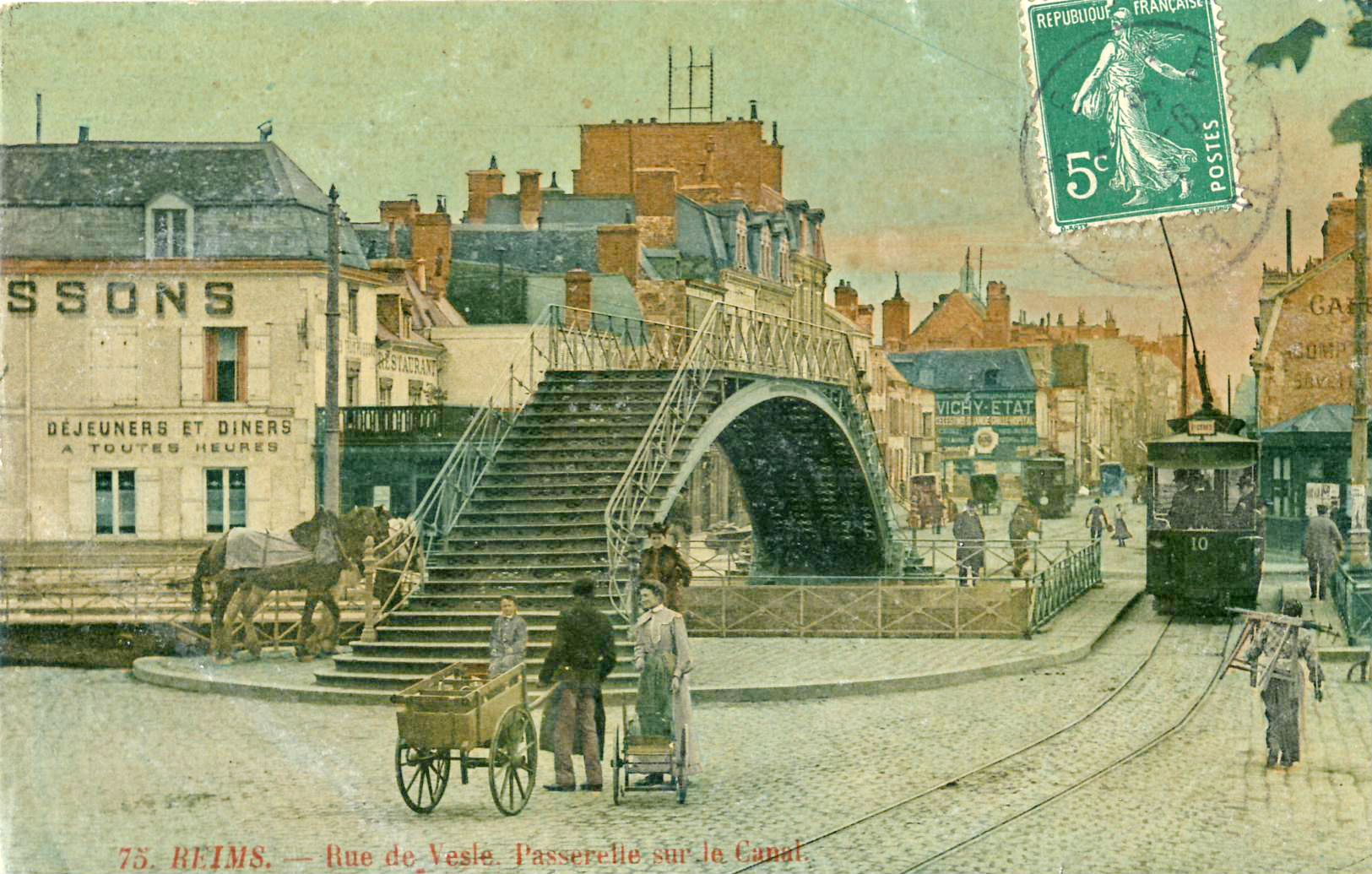 Carte postale ancienne sans mention d'éditeur, n°75 :REIMS - Rue de Vesle. Passerelle sur le Canal